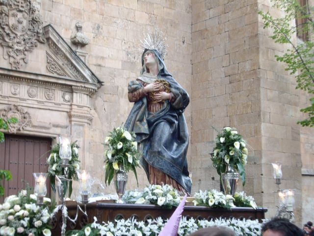 Dolorosa, obra de Inocencio Soriano Montagut. Salamanca (España)